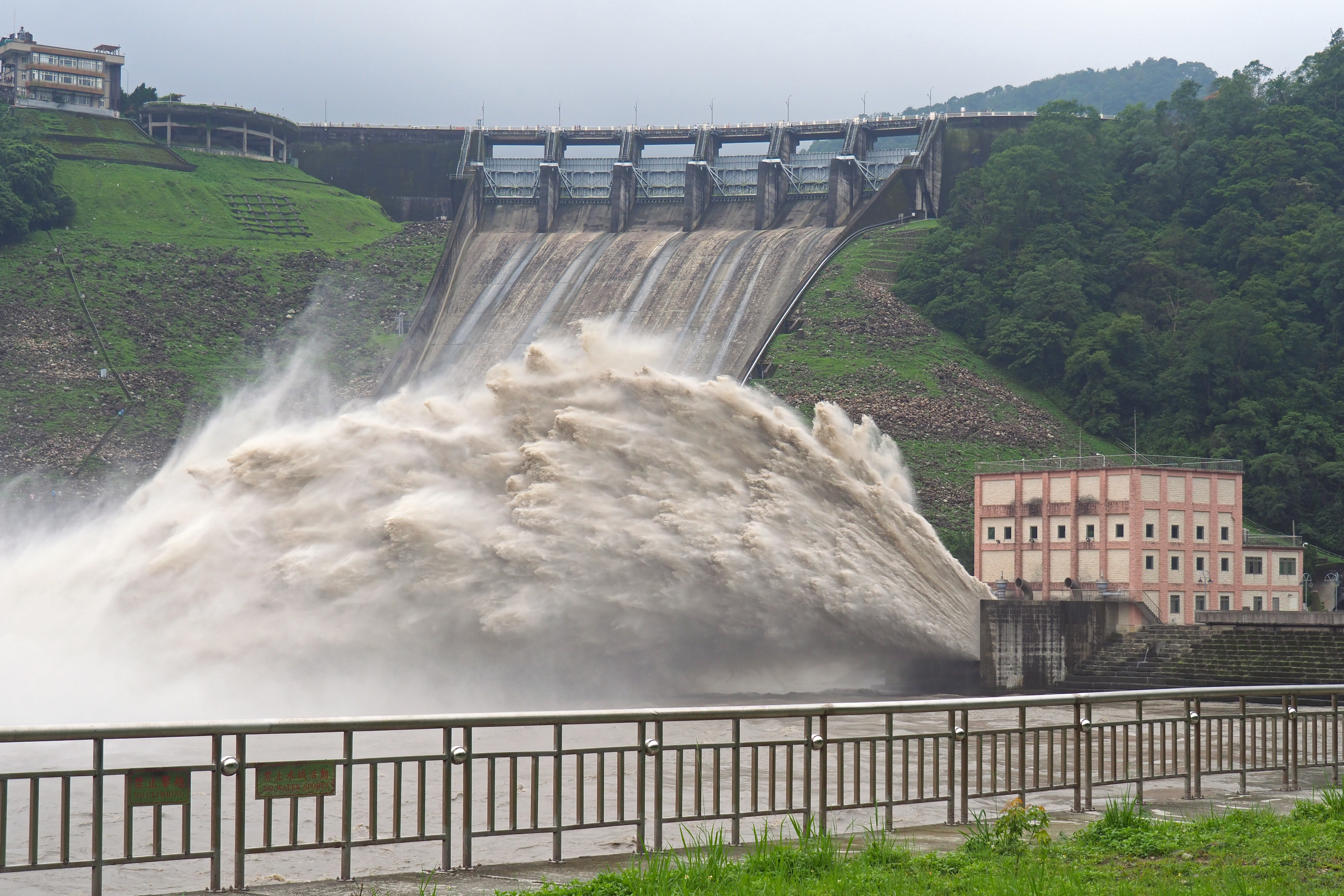 石門水庫正經由電廠放流口進行排沙